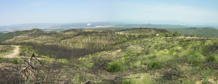 La Vinya Vella de Mussarra